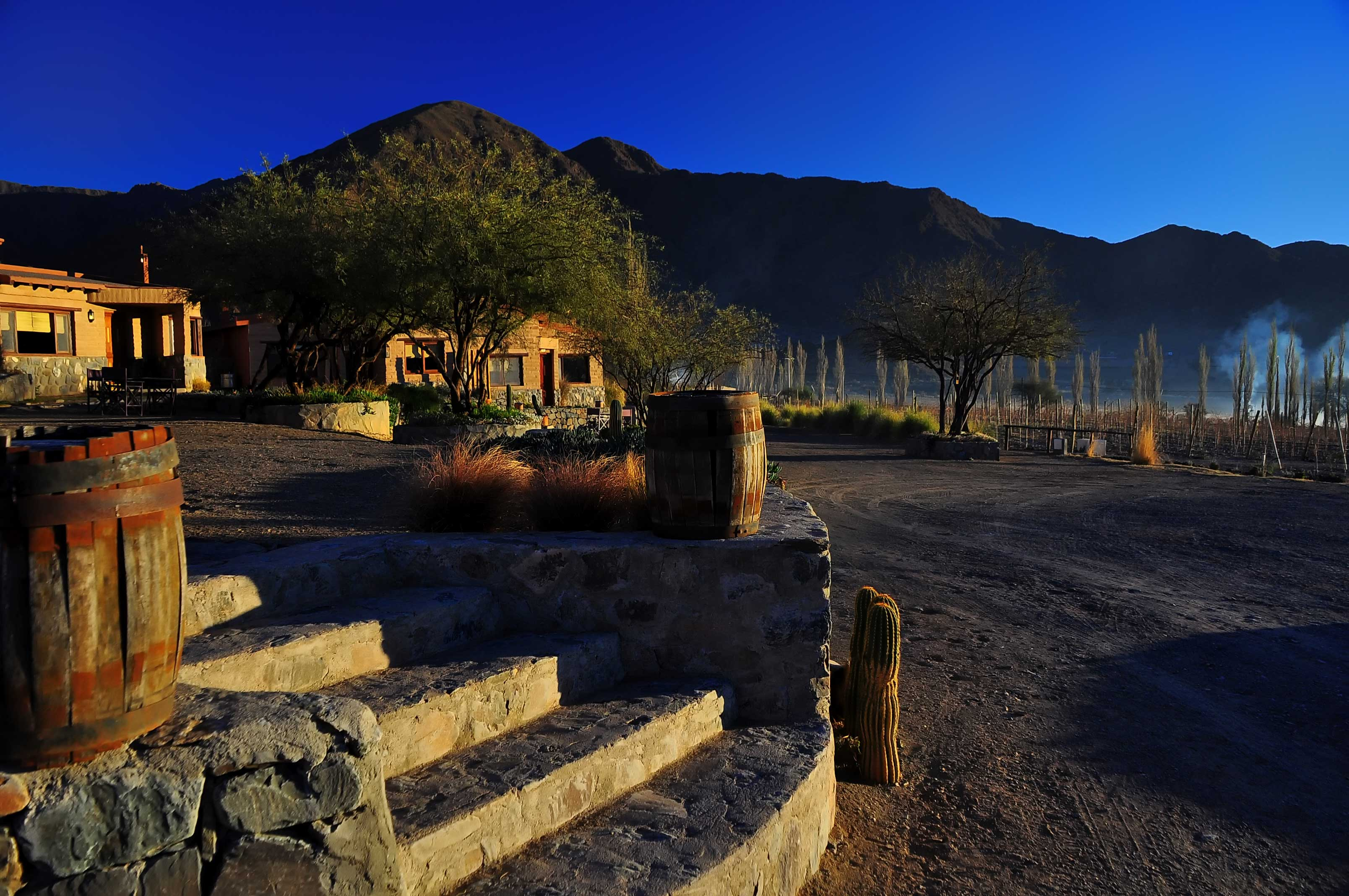 Miraluna Winery, Cachi, Argentina.